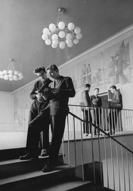 Dresden, Hochschule für Verkehrswesen Zentralbild Kohls 7.12.1959 Hochschule für Verkehrswesen in Dresden Die Hochschule für Verkehrswesen in Dresden, die im Jahre 1952 gegründet wurde, ist die einzige Spezialinstitution dieser Art in ganz Westeuropa. Im Direktstudium befinden sich zur Zeit 2226 Studenten. Es ist nicht Aufgabe der Hochschule, allgemeine Maschinen, Elektro- und Bauingenieure oder Diplom-Wissenschaftler zu entwickeln, sondern die Ausbildung richtet sich stets nach den besonderen Erfordernissen der einzelnen Zweige des Transport- und Nachrichtenwesens. Alle Erziehungs- und Ausbildungarbeit der Hochschule hat zum Ziel, Nachwuchskader für das sozialistische Transport- und Nachrichtenwesen der DDR auszubilden, die politisches Bewußtsein mit hoher fachlicher Qualifikation verbinden und unserer Arbeiter- und Bauernmacht treu ergeben sind. Die Lehr- und Forschungsarbeit wird in zwölf Richtungen, zwölf Instituten, 37 Lehrstühlen und sieben Dozenturen durchgeführt. 62 Professoren, Dozenten und Lektoren, 43 wissenschaftliche Mitarbeiter und 136 Assistenten sind z.Zt. an der Hochschule tätig. UBz: Studenten im Aufgang zum Auditorium maximum.